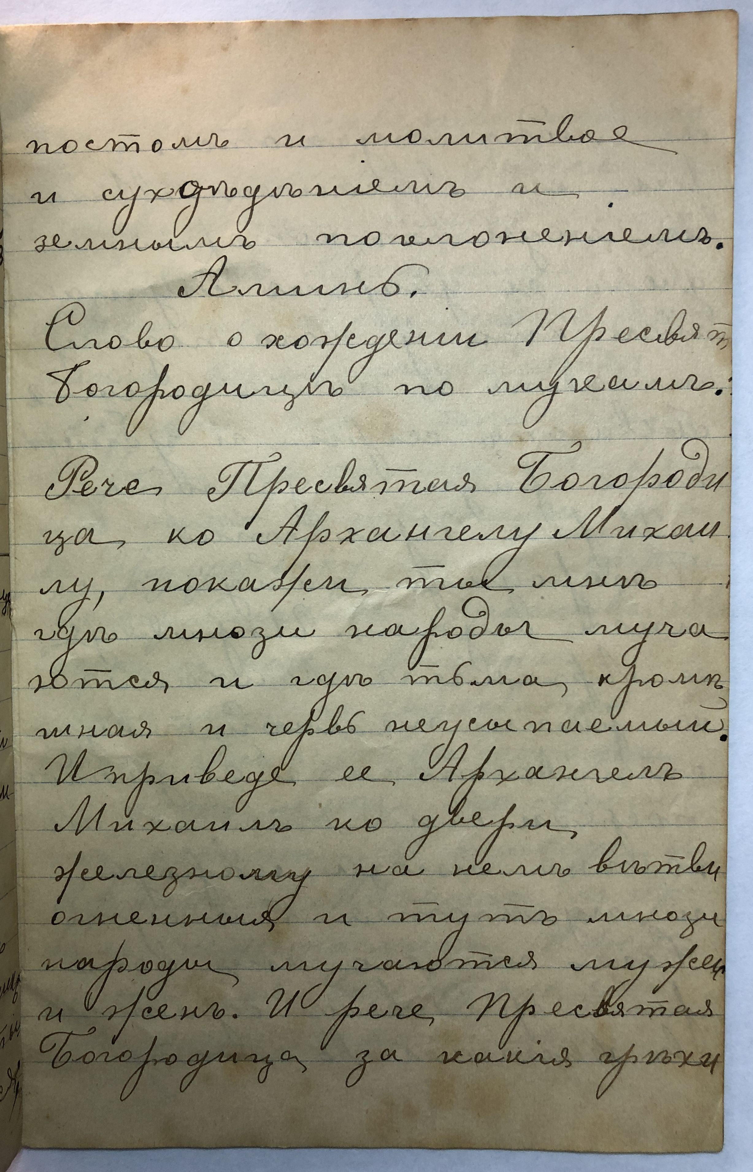 Слово о хождении Пресвятой Богородицы по мукам (рукопись, к. 19 века)